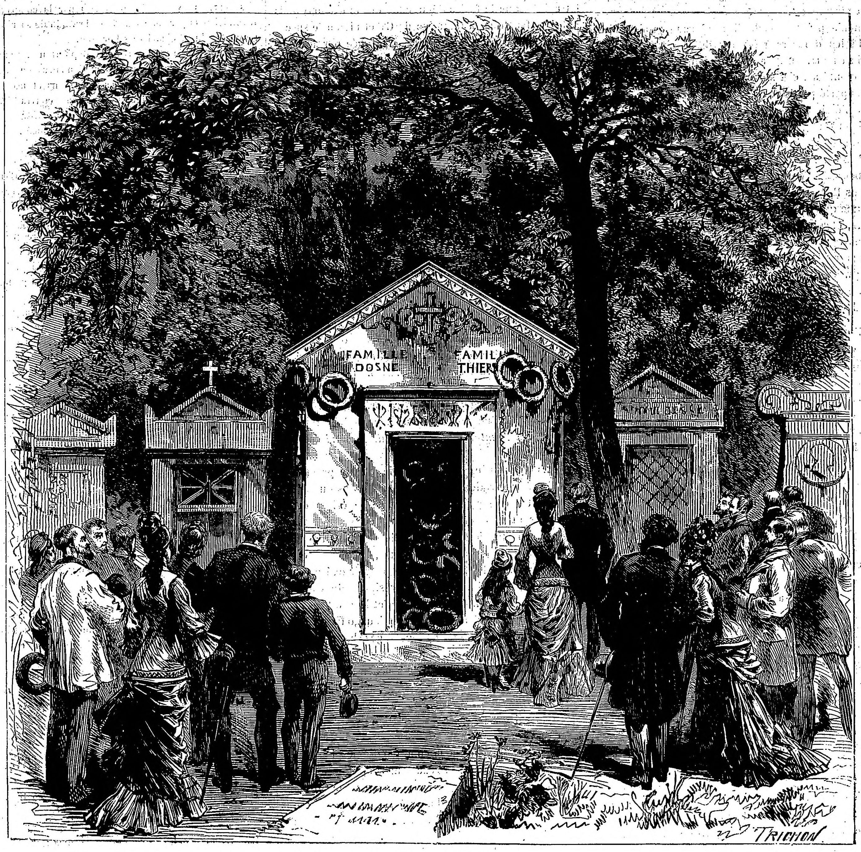 Sépulture de la famille Thiers dont Adolphe Thiers (1797-1877). Monument funéraire de l'architecte Aldrophe, orné d'un relief en marbre représentant le Patriotisme de Chapu et, à l'intérieur, d'une statue représentant l'Immortalité de Mercié. Concession de 152m². Initialement Adolphe Thiers a été enterré dans la chapelle Dosne-Thiers, avenue des Acacias, près de la tombe d'Étienne-Renaud-Augustin Serres.